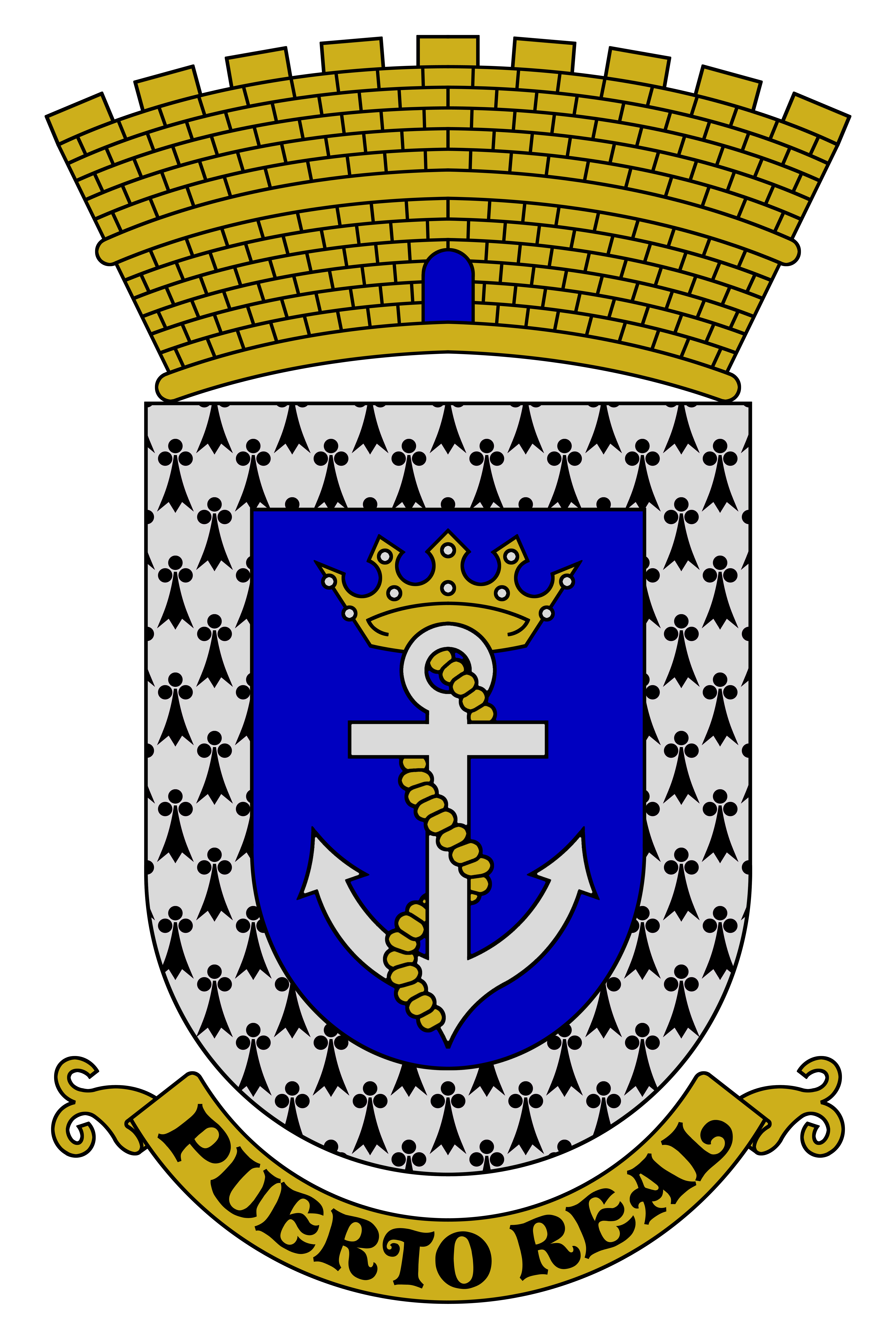 Escudo de Puerto Real